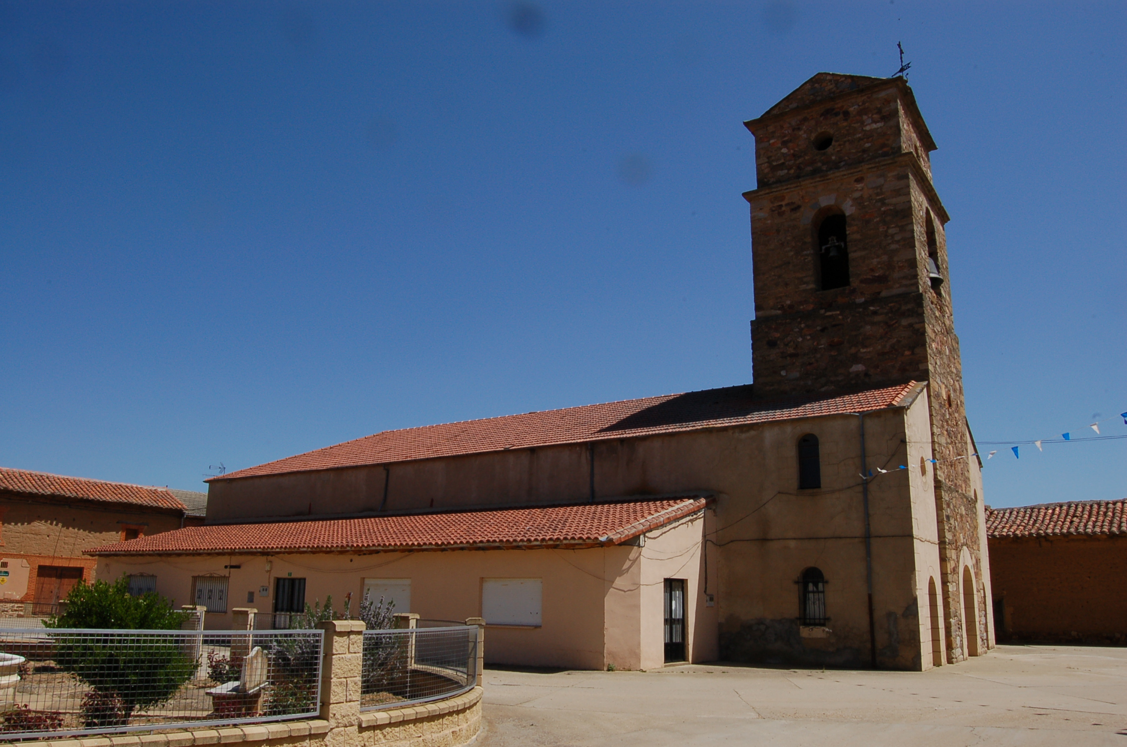 Igrexa de Santa María de la Vega